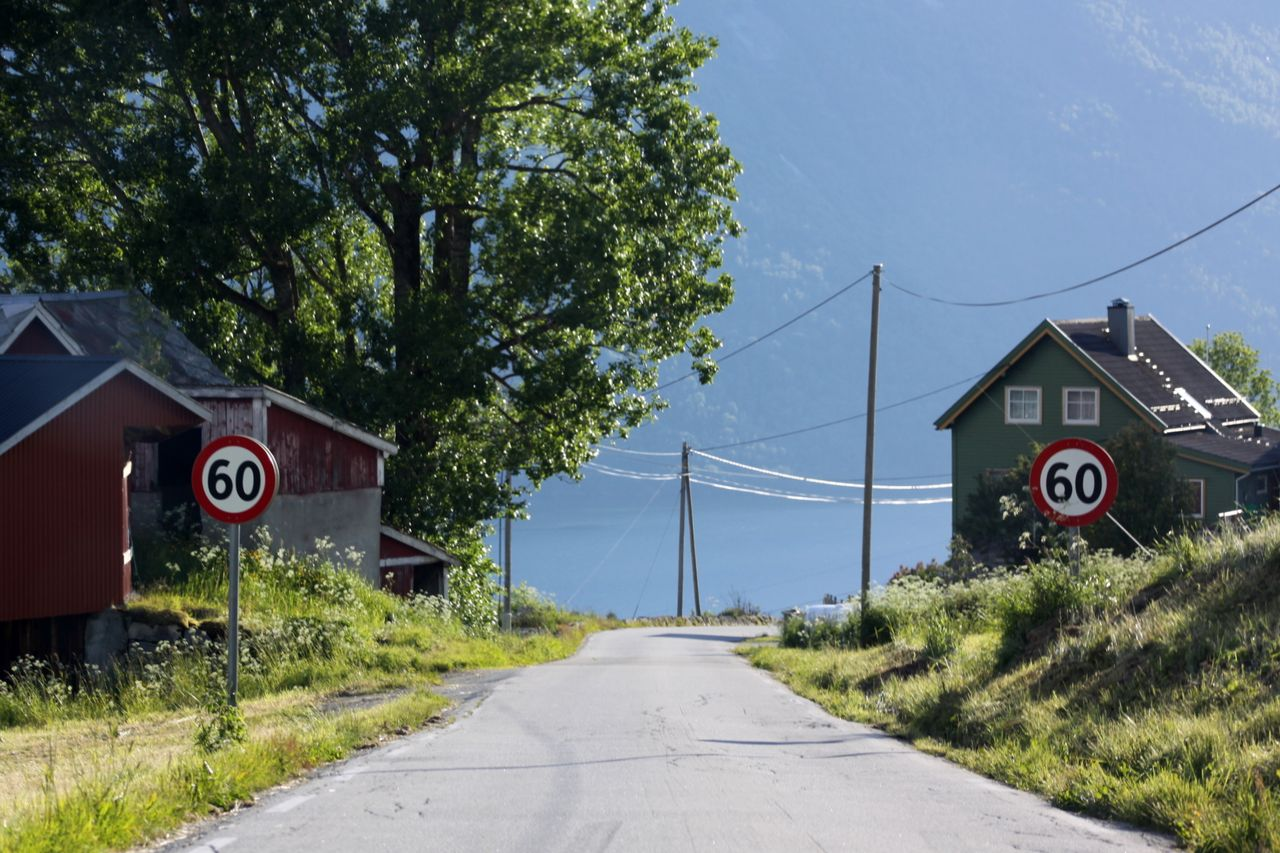 Fylkesvei 5736 (tidl. 692) i åsen over Reed i Gloppen.